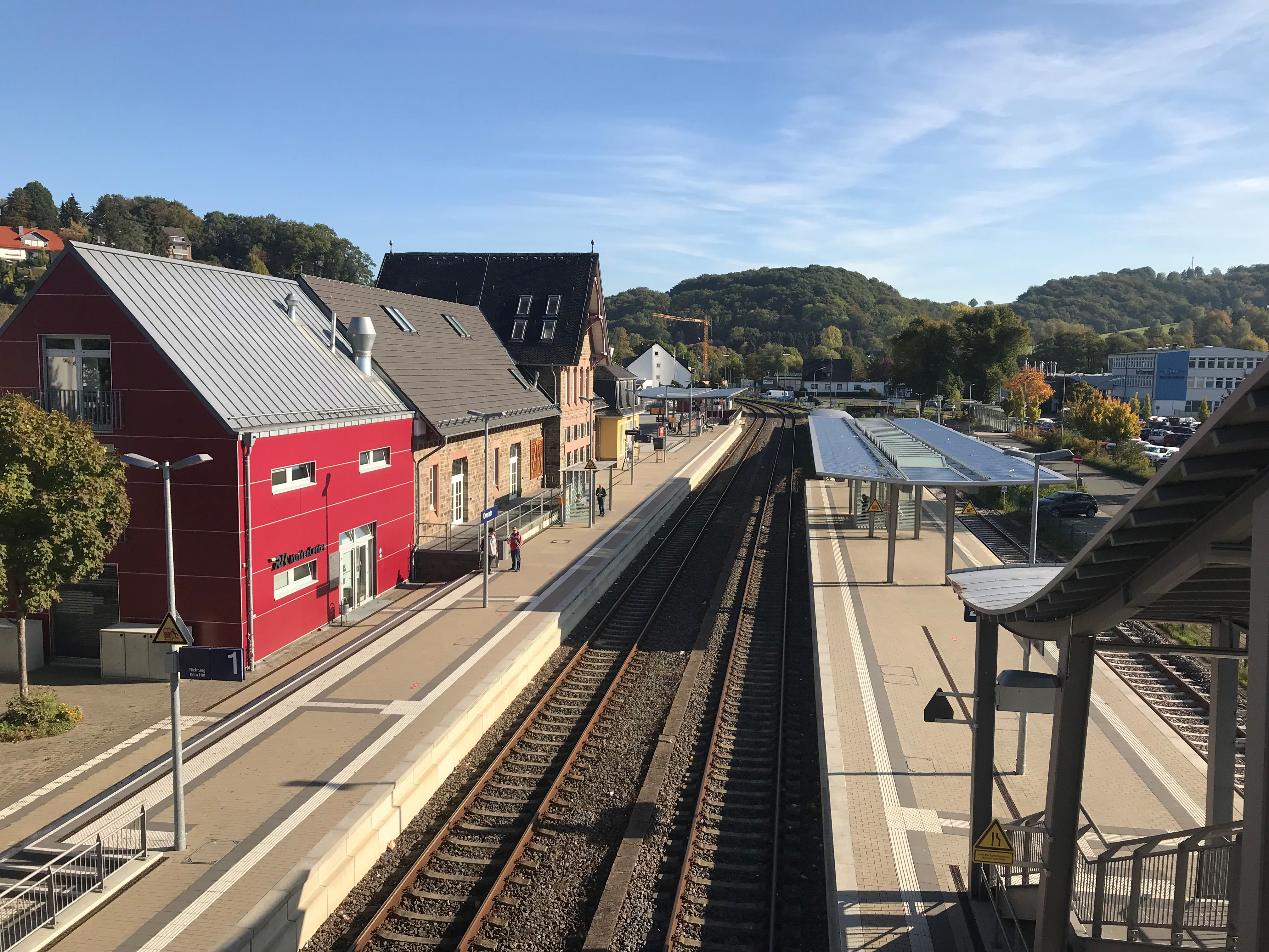 Bahnhof Overath 2018